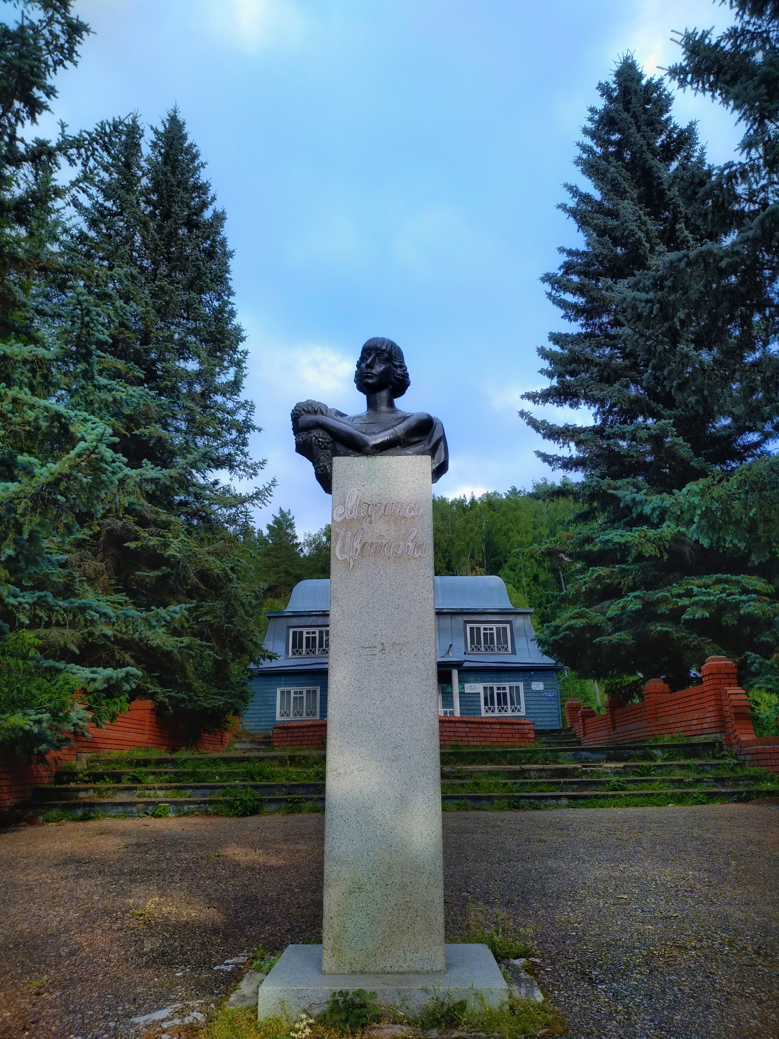 Установлен в 1992 году около здания музея к 100-летию со дня рождения поэтессы. На заднем плане бывший музей.